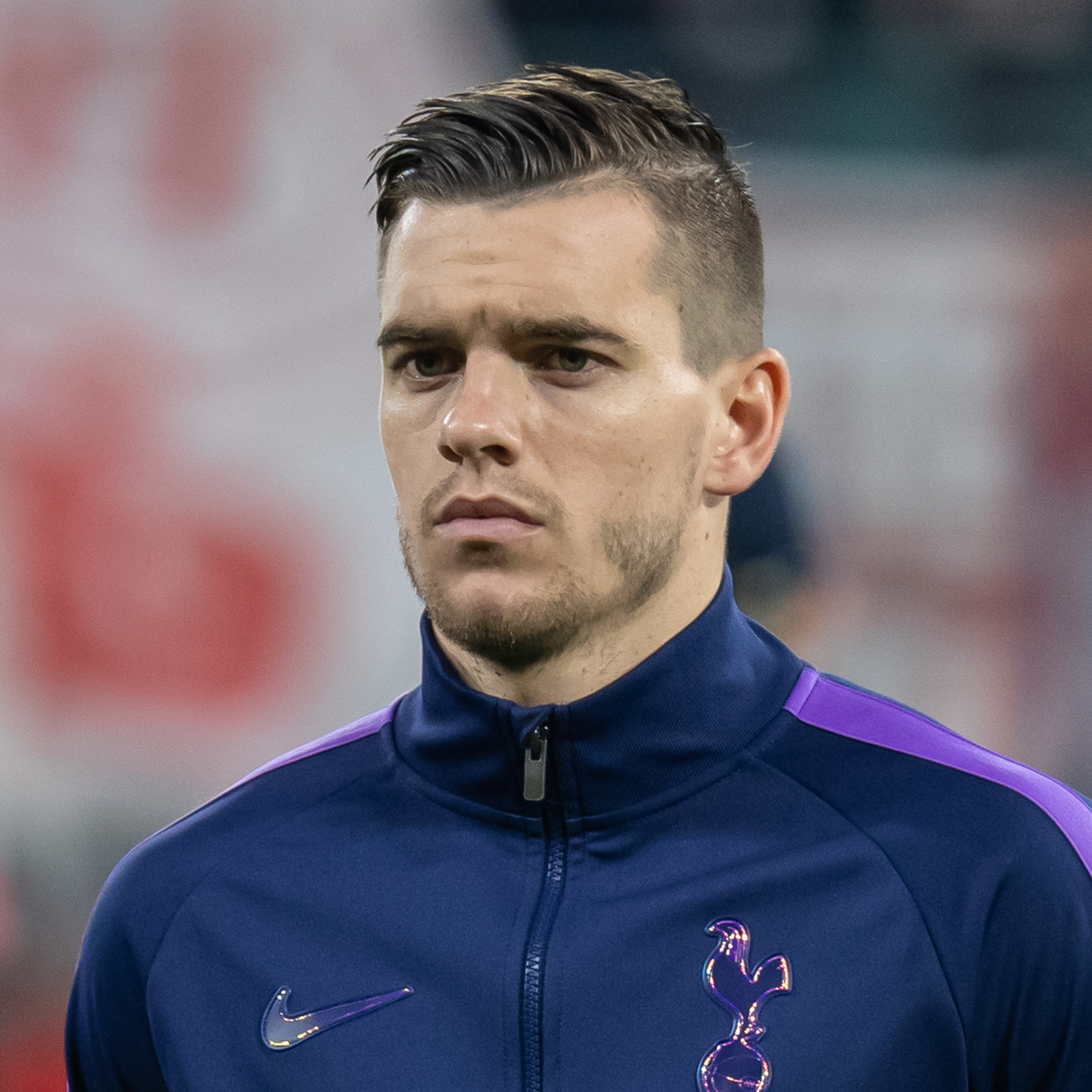 Fußball, Männer, UEFA Champions League Achtelfinale, RB Leipzig - Tottenham Hotspur; Giovani Lo Celso (Tottenham Hotspur, 18)